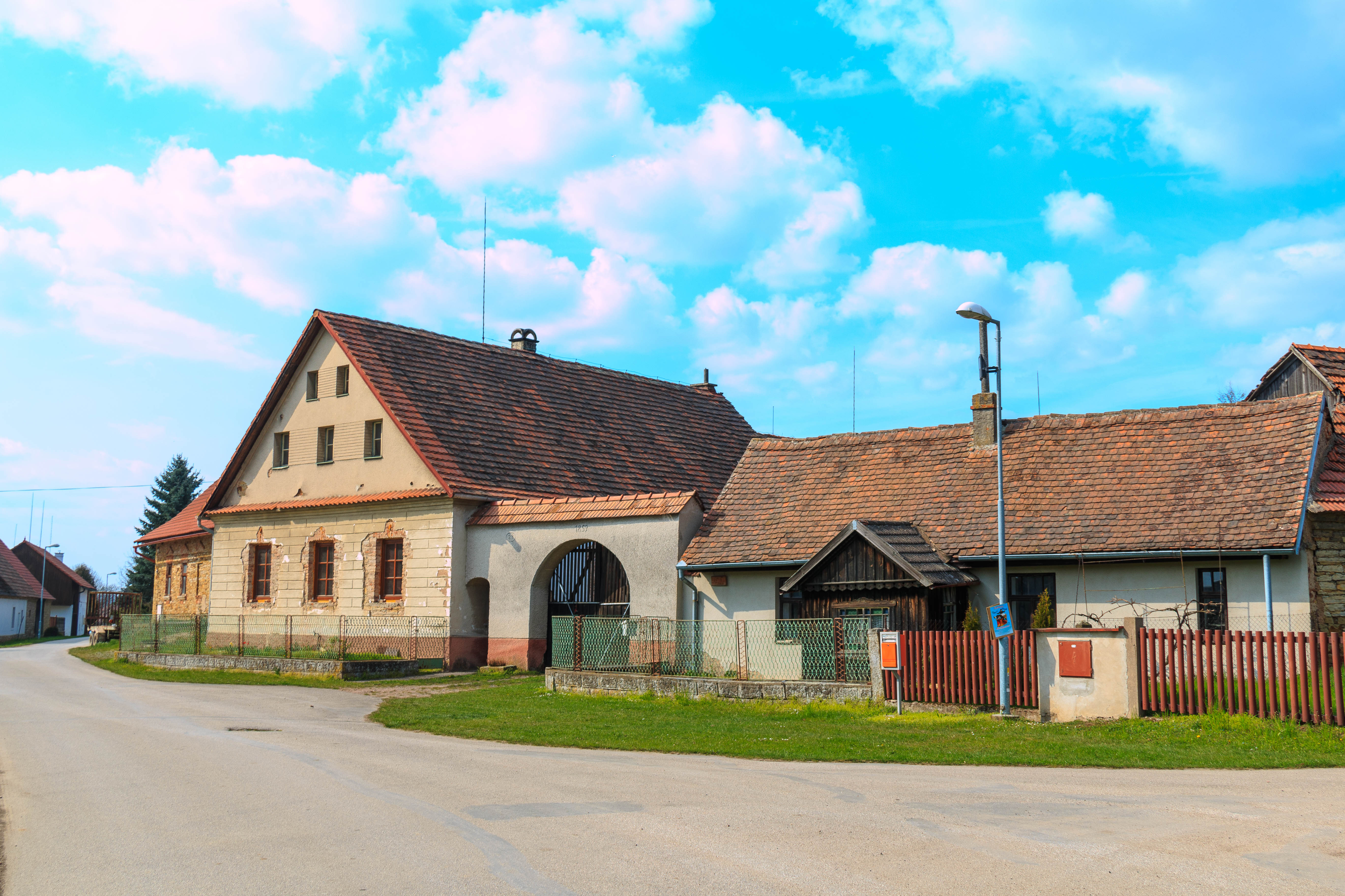 Lhota u Náhořan čp. 23